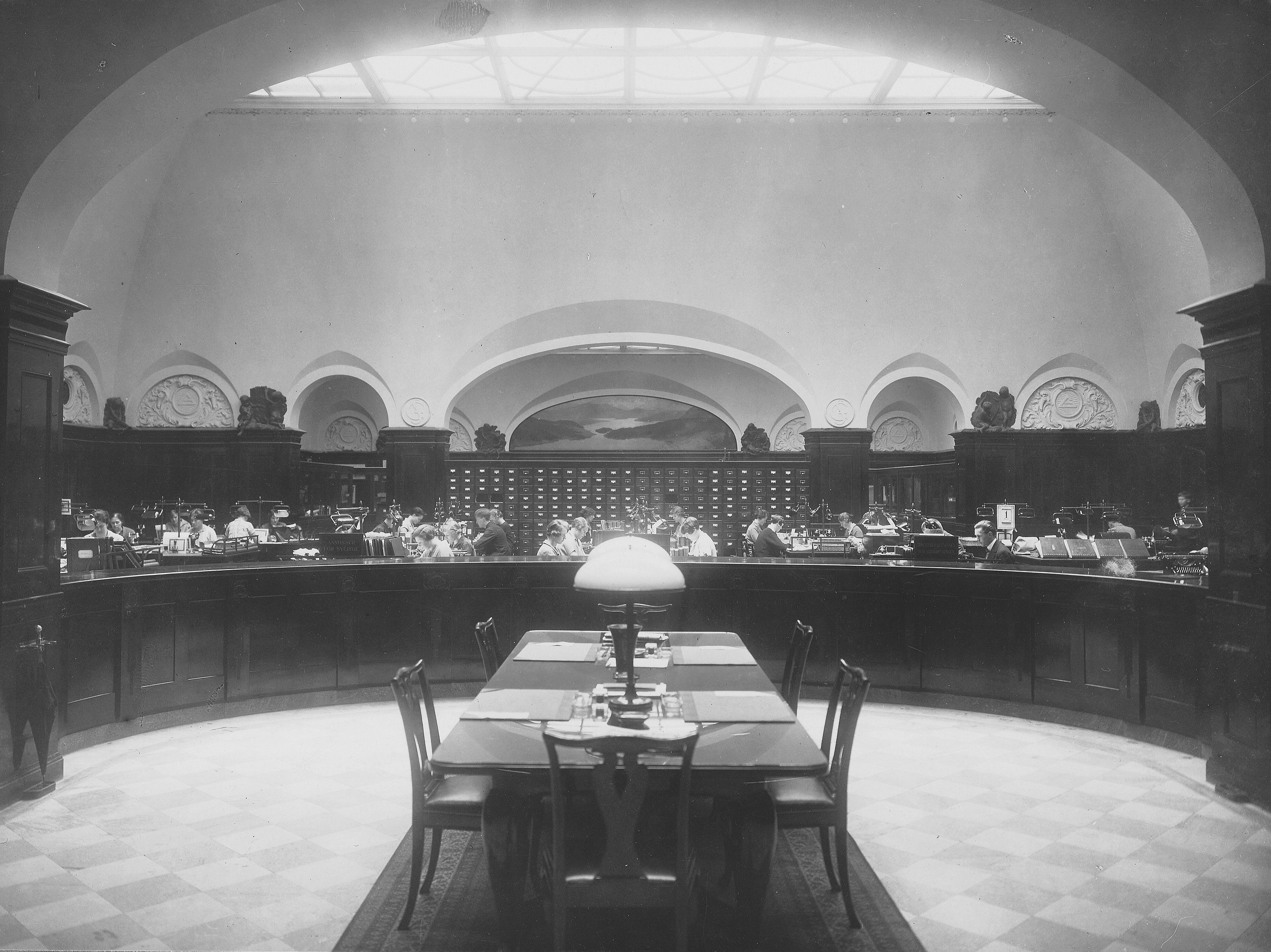 Sofia Gumaelius annonsbyrå, Fredsgatan 10, i f.d. Norrlandsbanken, Stockholm